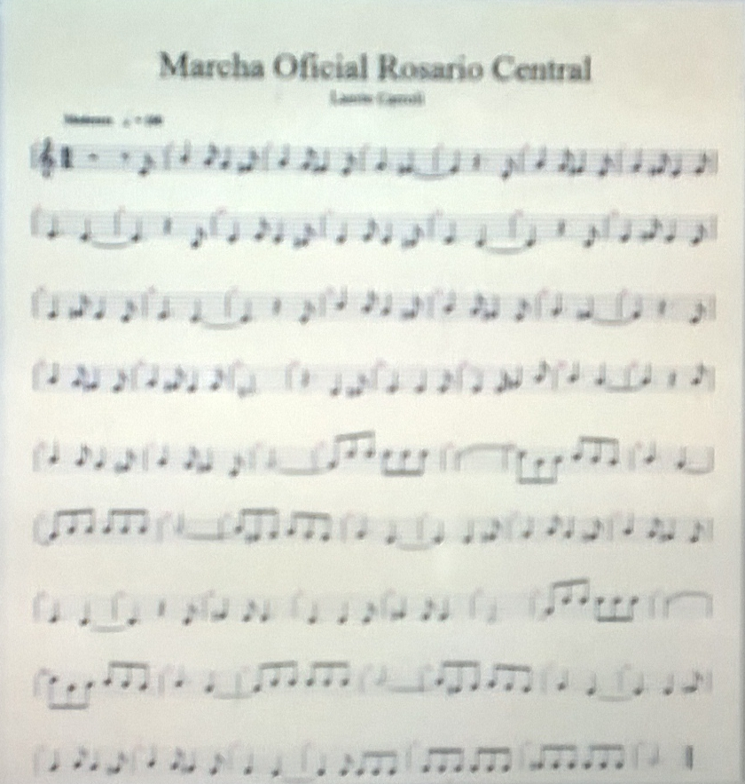 Partitura Marcha Oficial Rosario Central